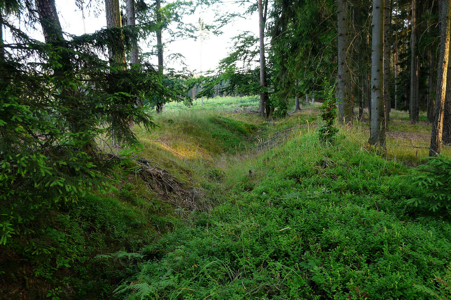 Čertova zeď - rýha po odtěžení magmatické žíly